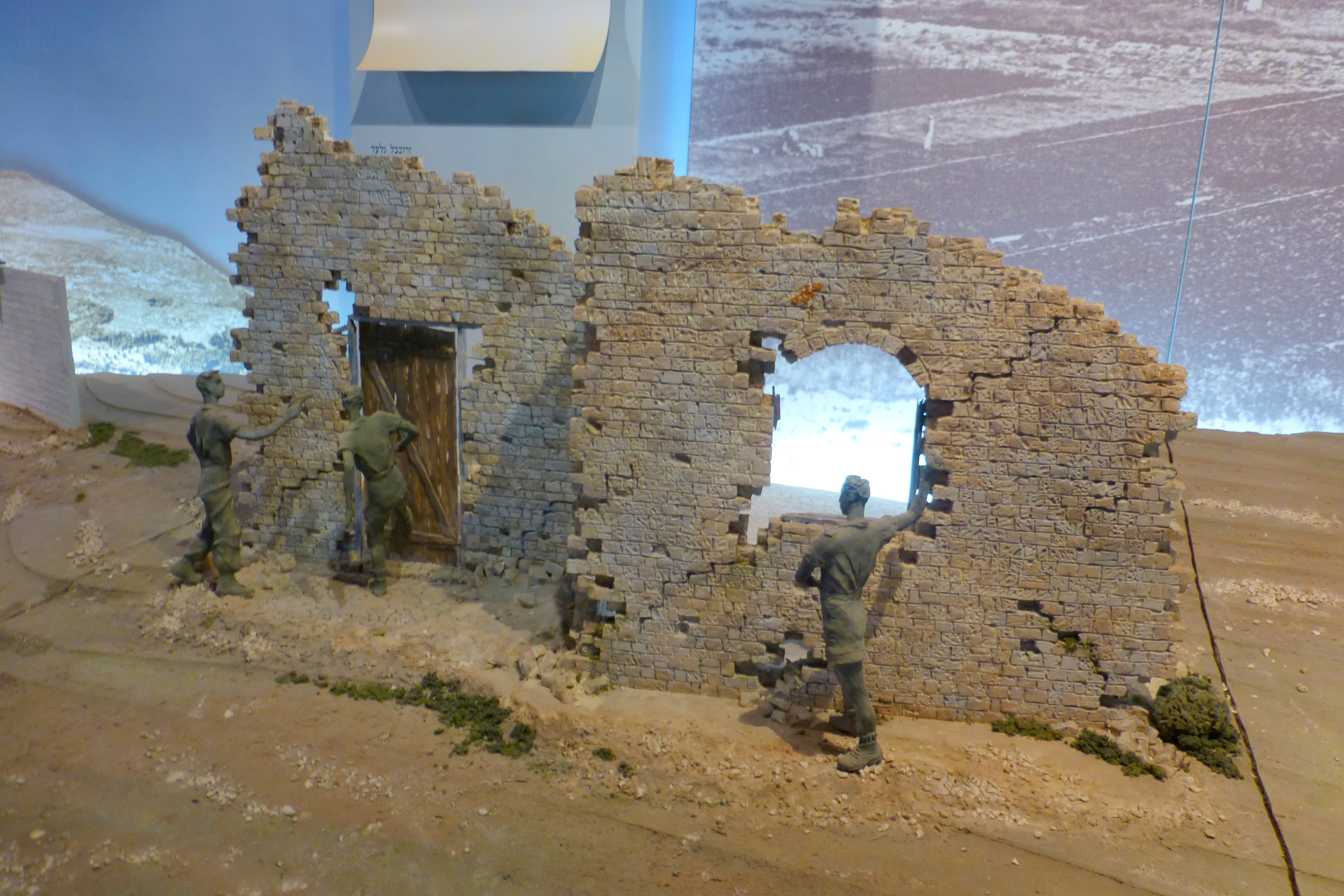 ג'וערה הוא בסיס גדנ"ע ומוזיאון הנמצאים על גבעה ברמות מנשה, במיקום היסטורי ששימש בעבר כבסיס ההדרכה המרכזי למפקדים של ארגון "ההגנה". שמה העברי של הגבעה הוא "גבעת נֹח".